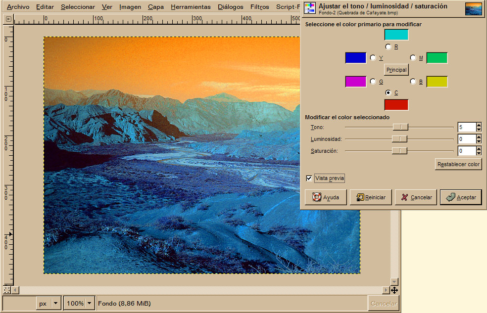 Ejemplo correcion de tono luminosidad y saturacion en Gimp.